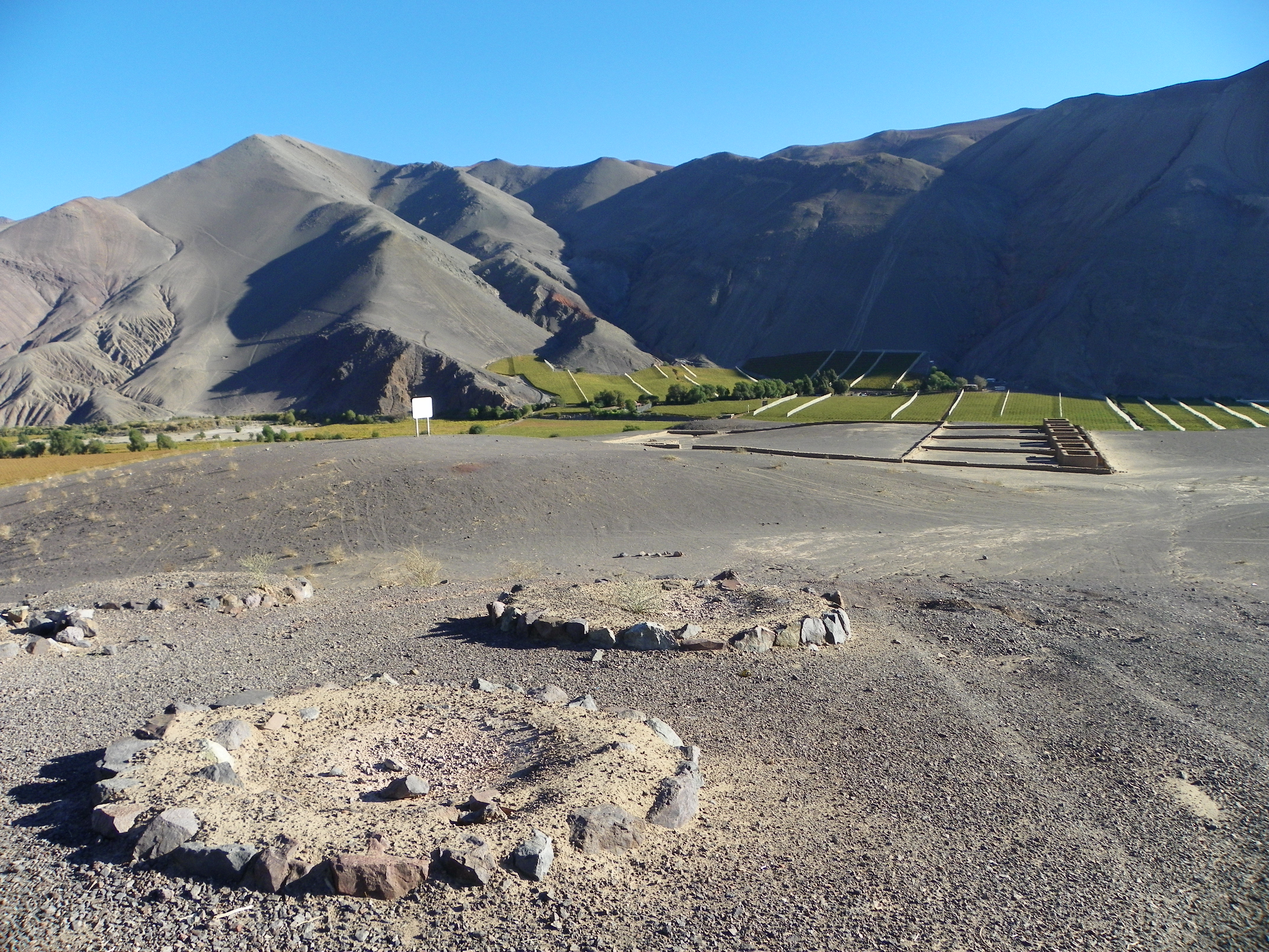 Hornos o huayras, donde se fundían minerales de cobre